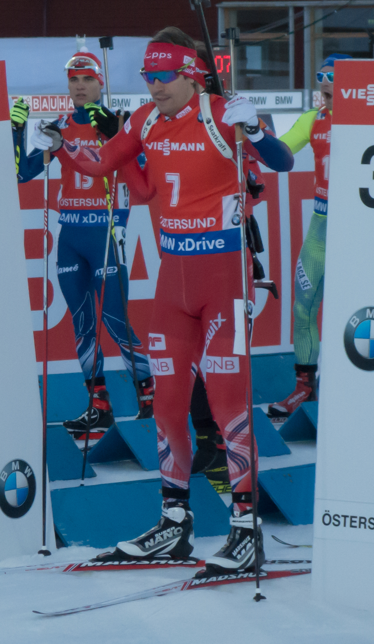 Emil Hegle Svendsen strax innan start i Jaktstarten vid Världscupen i Östersund 2015